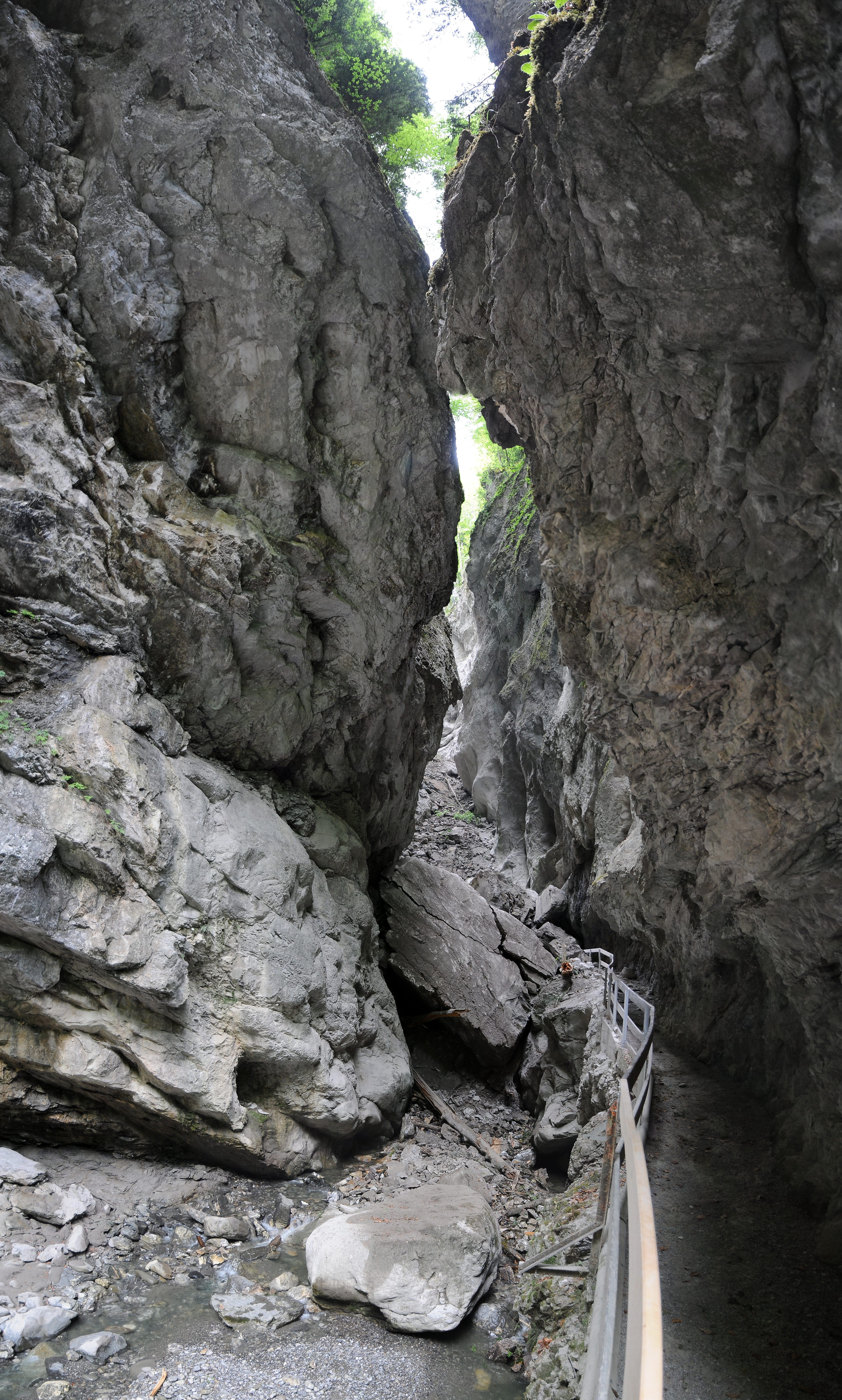 Vertikalpanorama im Bereich der eingestürzten Brücke in der Rappenlochschlucht, Blickrichtung schluchteinwärts. Am 10. Mai 2011 stürzt die Rappenlochbrücke infolge eines Felssturzes unter der Brückenauflage ein. NOTE: This image is a panorama consisting of multiple frames that were merged or stitched in software. As a result, this image necessarily underwent some form of digital manipulation. These manipulations may include blending, blurring, cloning, and colour and perspective adjustments. As a result of these adjustments, the image content may be slightly different from reality at the points where multiple images were combined. This manipulation is often required due to lens, perspective, and parallax distortions.